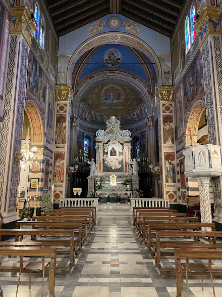 Santuario di Nostra Signora del Ponte, Lavagna, Liguria, Italia